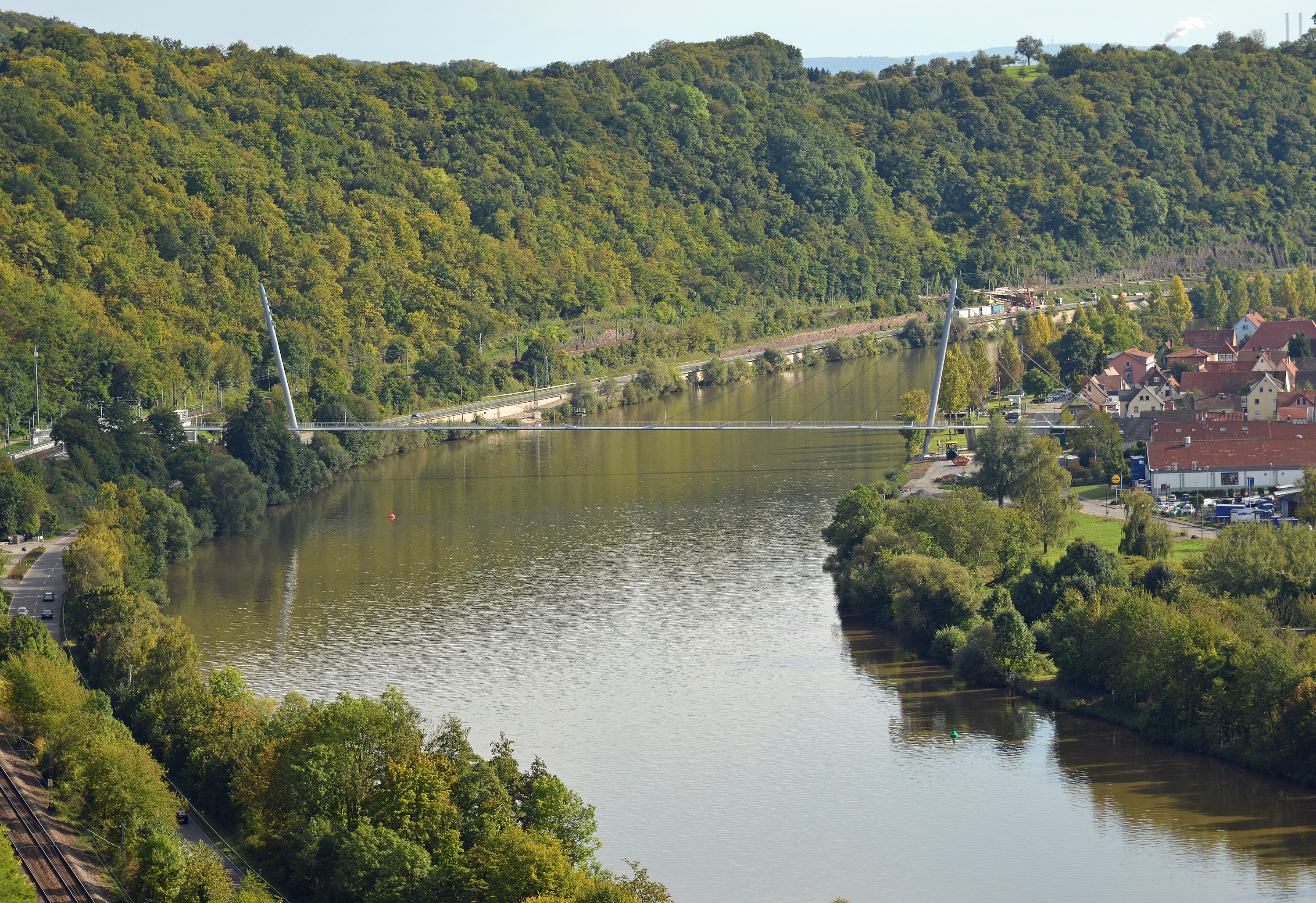 Fussgängerbrücke in Hassmersheim, eröffnet September 2014. Auf der 3 m breite Brücke ist nur Fußverkehr zugelassen.